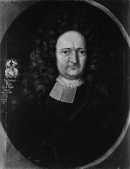 Gemälde in der Professorengalerie Tübingen